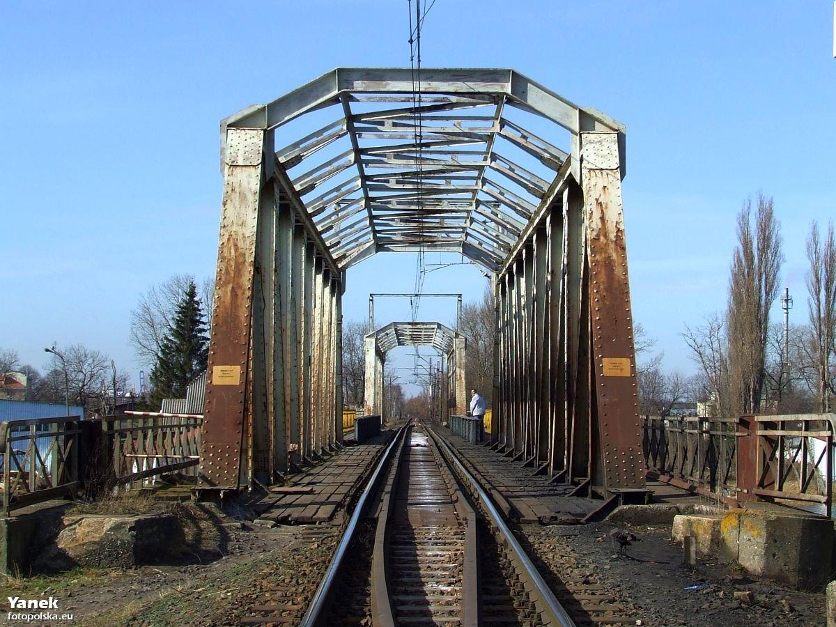 Gdańsk Sienna Grobla II. Most kolejowy linii 226 na Martwej Wiśle, kierunek Port Północny.